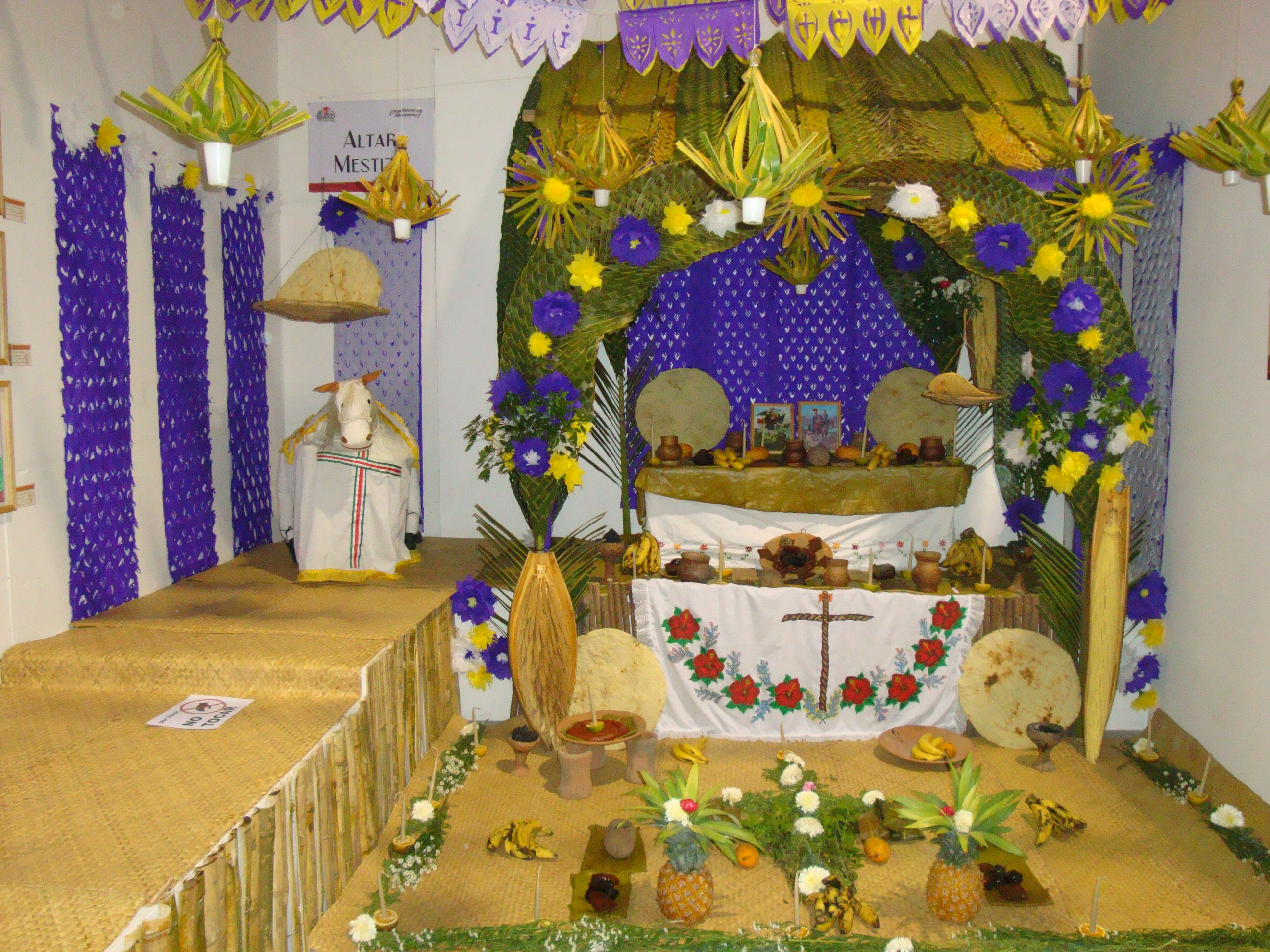 Altar indigena Maya Chontal del estado de Tabasco Mexico